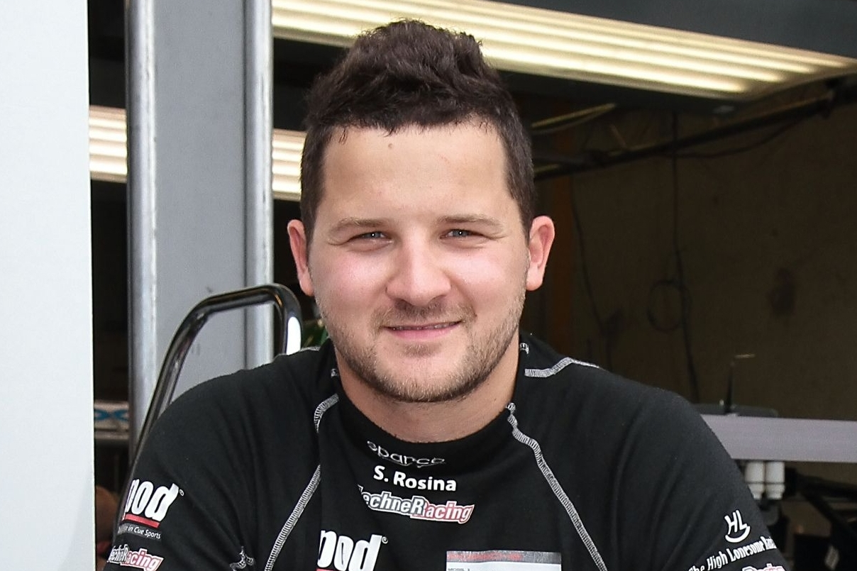 Stefan Rosina_Reiter Engineering_Lamborghini Gallardo FL2_Blancpain Sprint Series_Zandvoort_2014